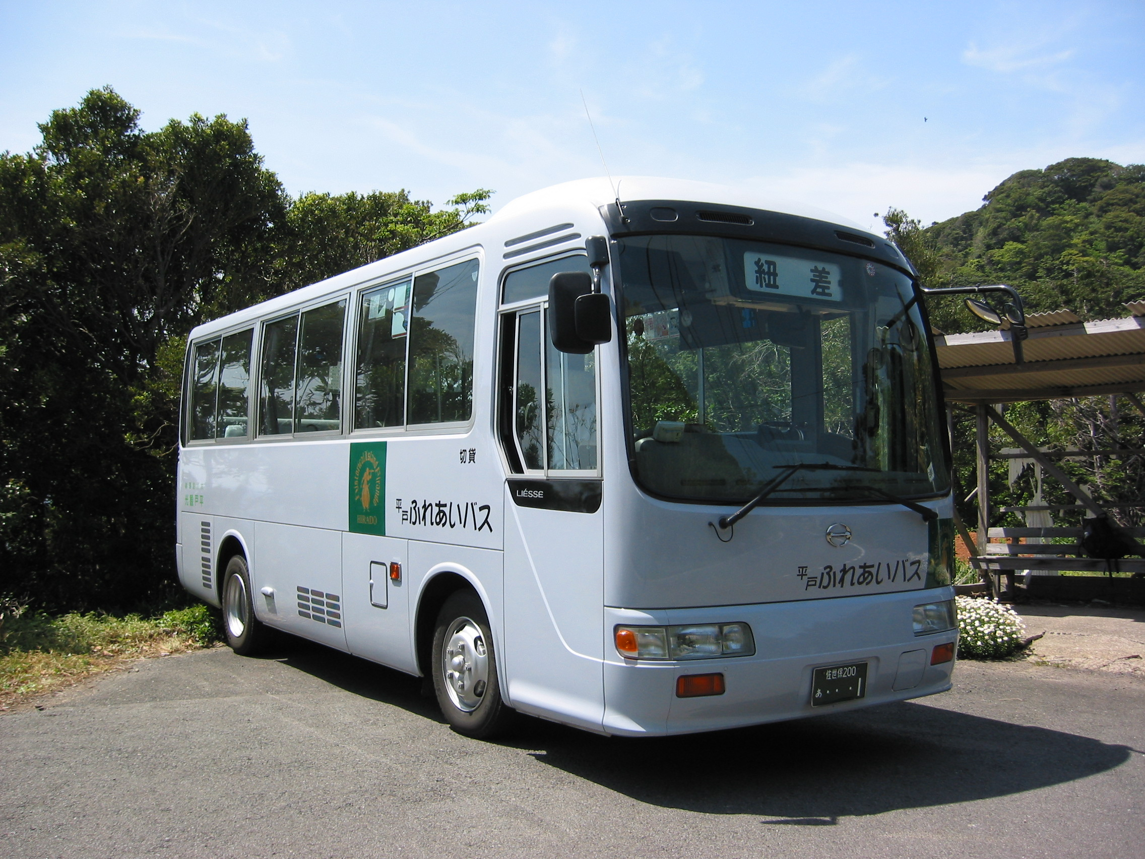 大川陸運 平戸ふれあいバスの車両